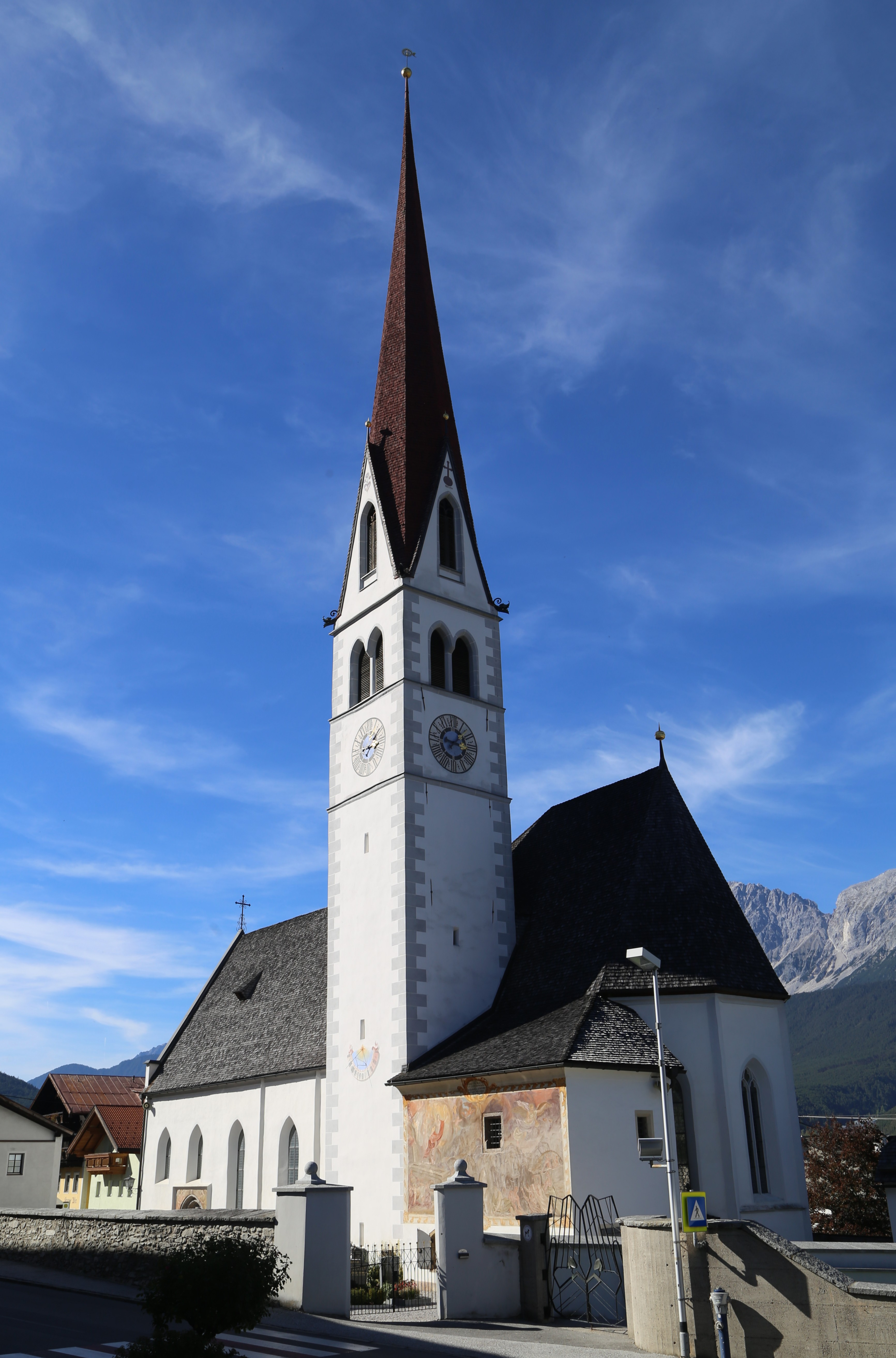 Kath. Pfarrkirche Mariä Himmelfahrt, Dorfplatz, Pfaffenhofen (Tirol); Über einer frühchristlichen Kirche wurde im 14./15. Jahrhundert ein spätgotischer Bau errichtet, der im 18. Jahrhundert barockisiert wurde. 1860/1863 wurde die Kirche nach Plänen von August Essenwein und Josef von Stadl erweitert und regotisiert. Der einschiffige Bau mit steilem Satteldach, zweijochigem Chor und dreiseitigem Chorschluss weist am Langhaus und Chor eine gotische Gliederung in Form von Dreikantlisenen und einem umlaufenden Kaffgesims auf. Die Westfassade zeigt einen steilen, im Ansatz abgetreppten Fassadengiebel und ein spitzbogig gekehltes Portal. An der Sakristei befindet sich ein Wandbild Auferstehung Christi und Jüngstes Gericht von Leopold Puellacher von 1826. Das Innere ist mit Pilastern gegliedert und weist im Langhaus eine durch Gurtbögen gegliederte Stichkappentonne, im Chor ein Sternrippengewölbe mit spätgotischer Wand- und Rankenmalerei auf Object location47° 17′ 56.86″ N, 11° 04′ 58.4″ E